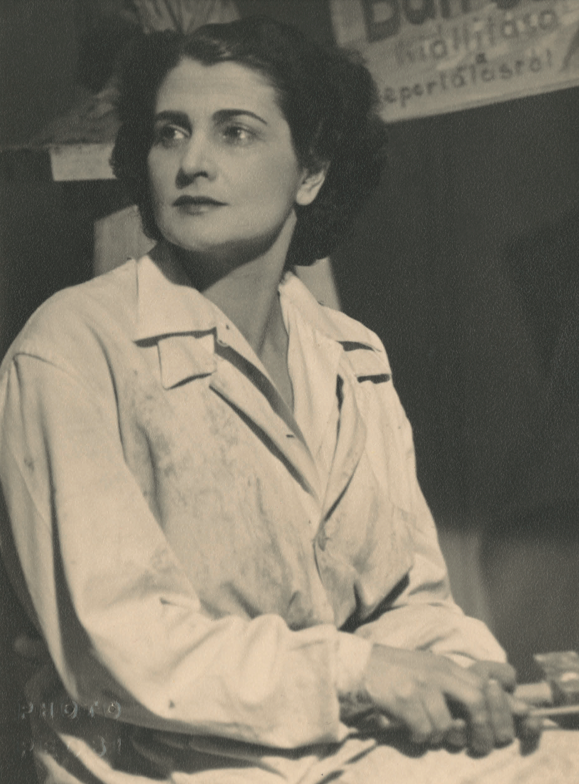 Edith Kiss vor ihrer Ausstellung 'Deportation', Budapest 22.9.1945